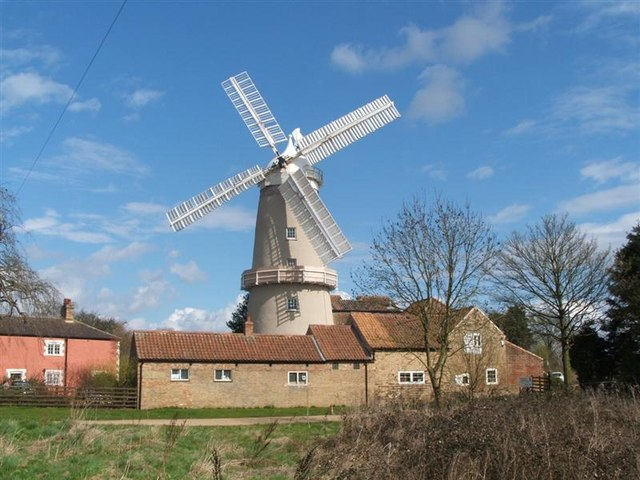 Denver mill, Norfolk